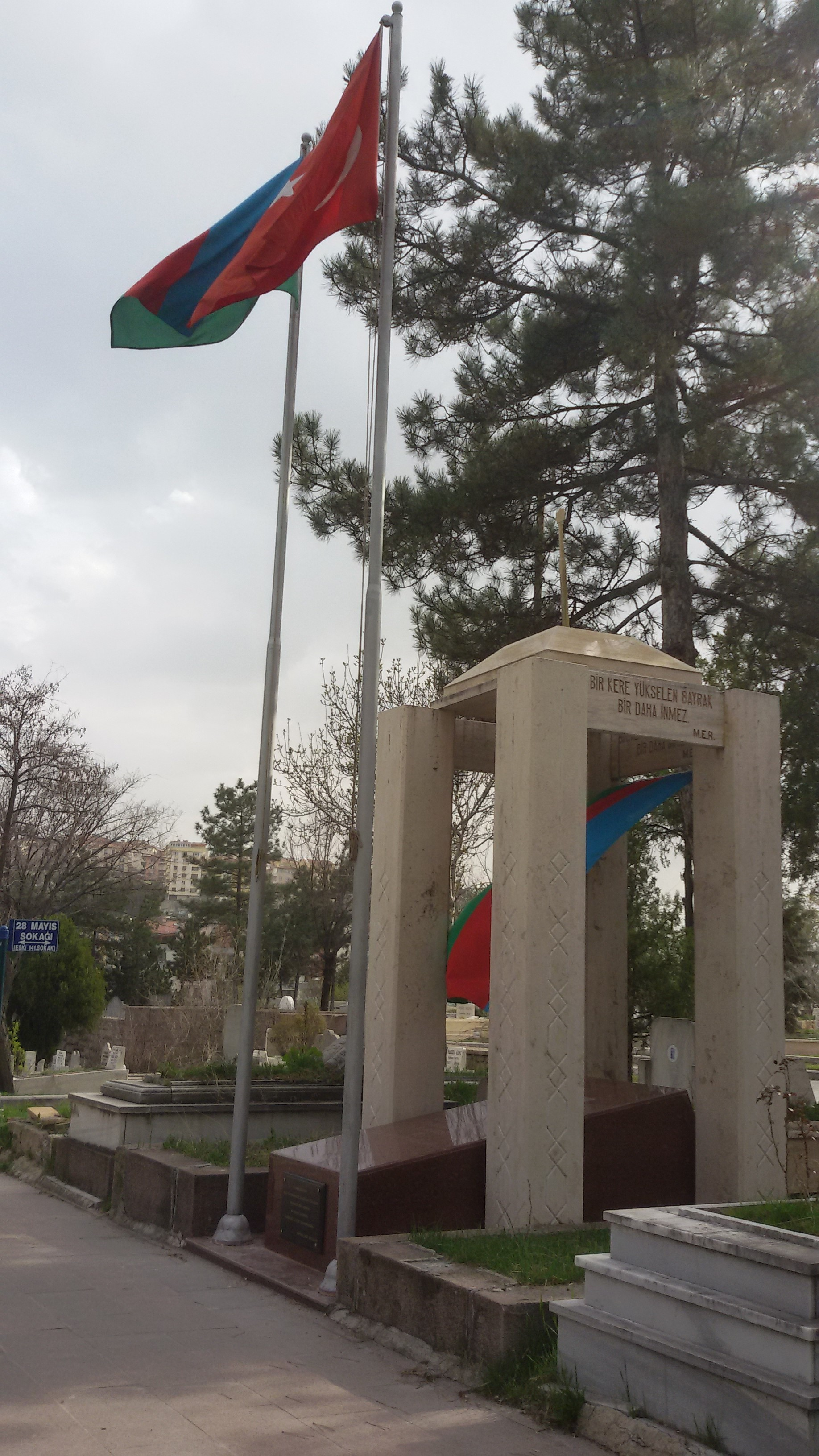 Məhəmməd Əmin Rasulzadənin Ankara şəhərində Cebeci Asri Mezarlığında məzarı (ümumi görünüş)